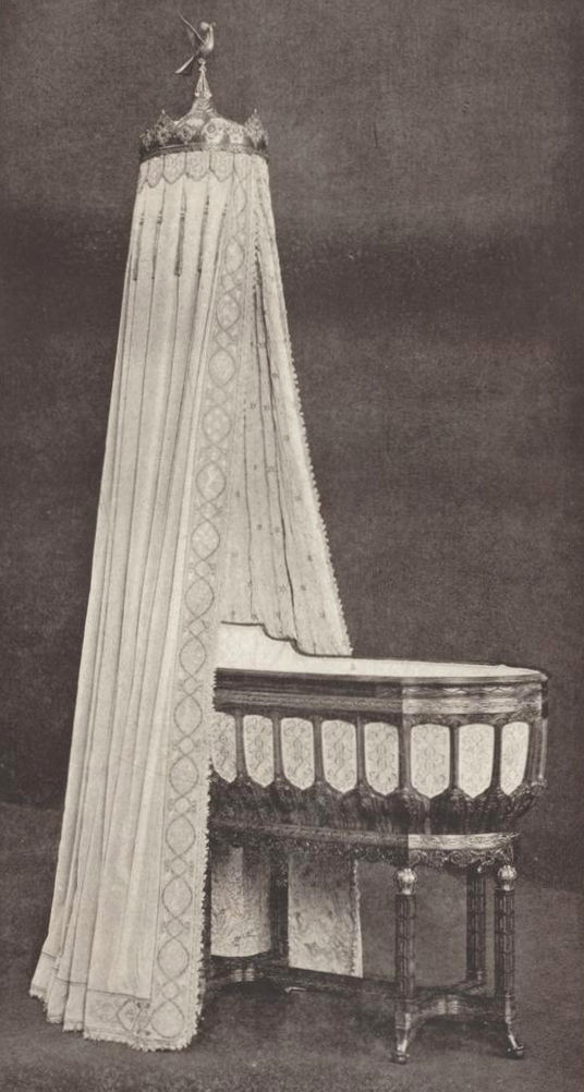 Amsterdamse wieg, ontworpen door Karel de Bazel en aangeboden aan koningin Wilhelmina door de Amsterdamse vrouwen en meisies (1909)